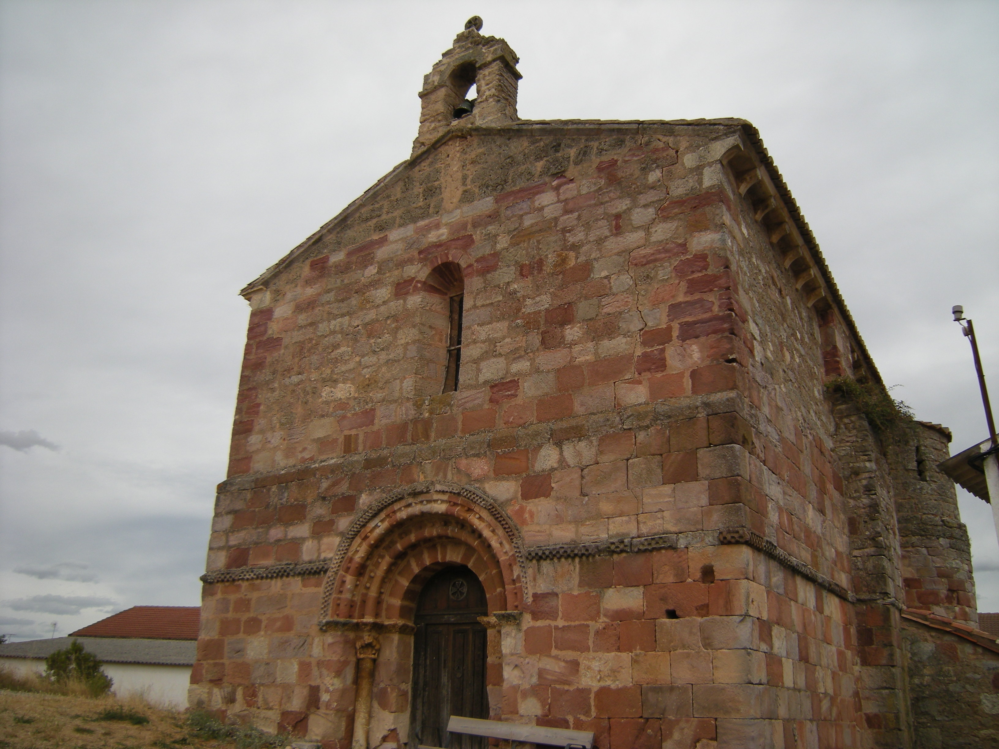 Iglesia de San Vicente Mártir de Becerril del Carpio